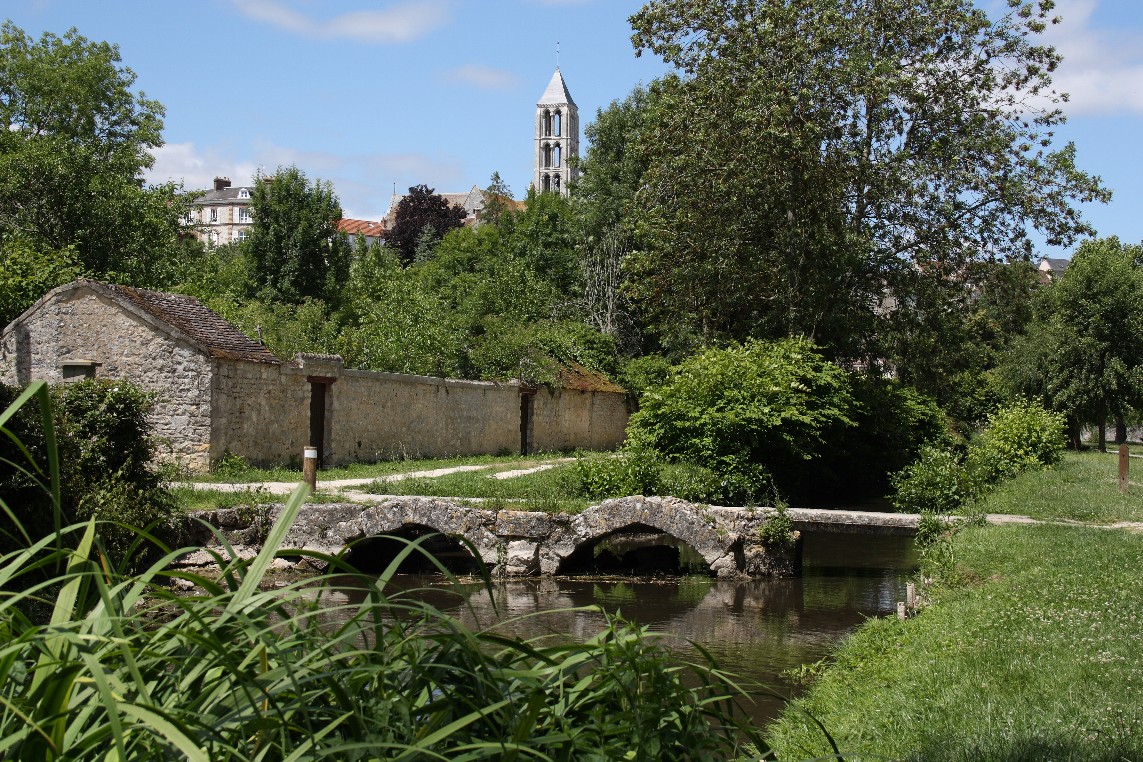 Château-Landon, eine Gemeinde im Département Seine-et-Marne (Île-de-France), Blick auf den Kirchturm von Notre-Dame de l'Assomption, im Vordergrund Brücke Pont de César (vor 1700) über dem Bach Fusain